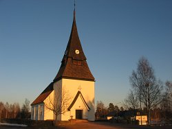 Venjanskyrka Foto:Bengt B